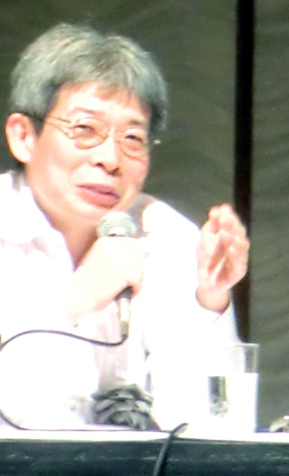 富田倫生さん追悼イベント「青空文庫の夢：著作権と文化の未来」で発言する平田オリザ。東京會舘ローズルームにて。